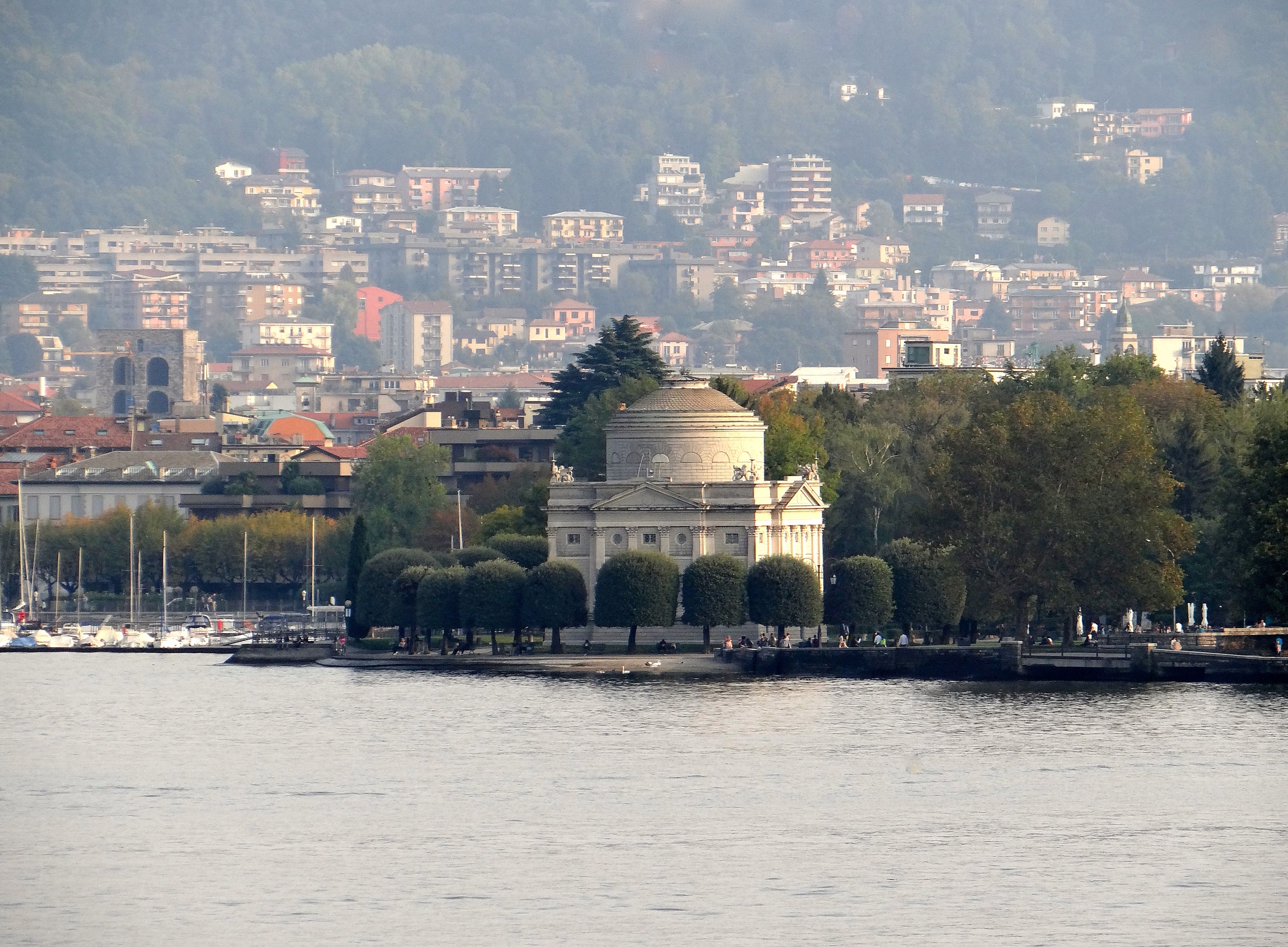 Tempio Voltiano This is a photo of a monument which is part of cultural heritage of Italy.